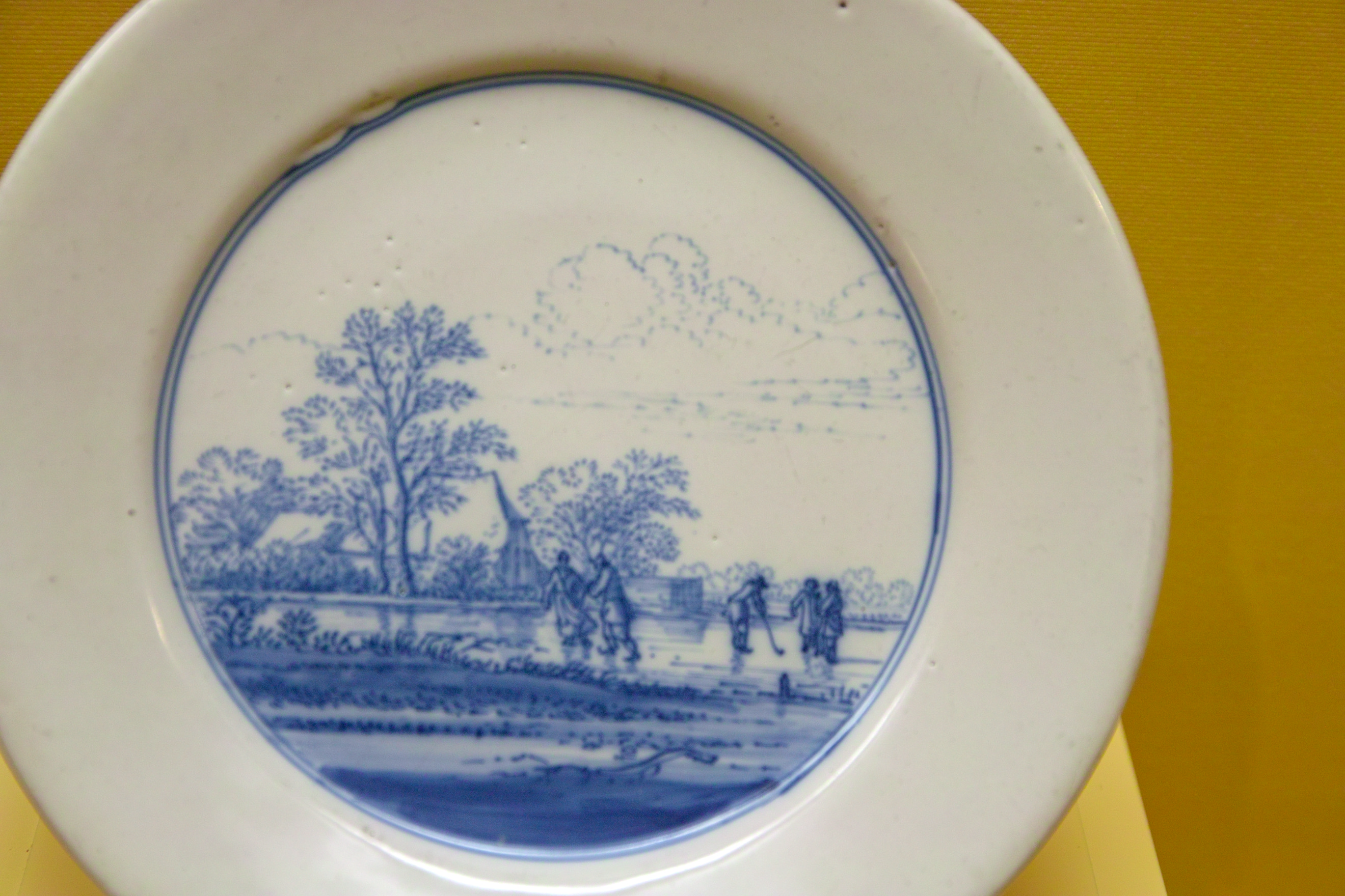 Fayence. Museum für Kunst und Gewerbe, Hamburg. Beschriftung: "Teller mit Winterlandschaft. Delft, 1670 - 1685. Malerei von F.v. Frijtom." (Frederik van Frijtom)